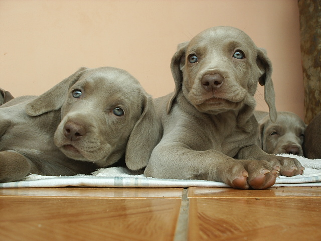 Weimaraner Puppies